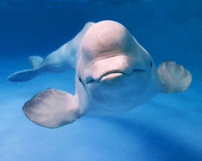 Beluga whale